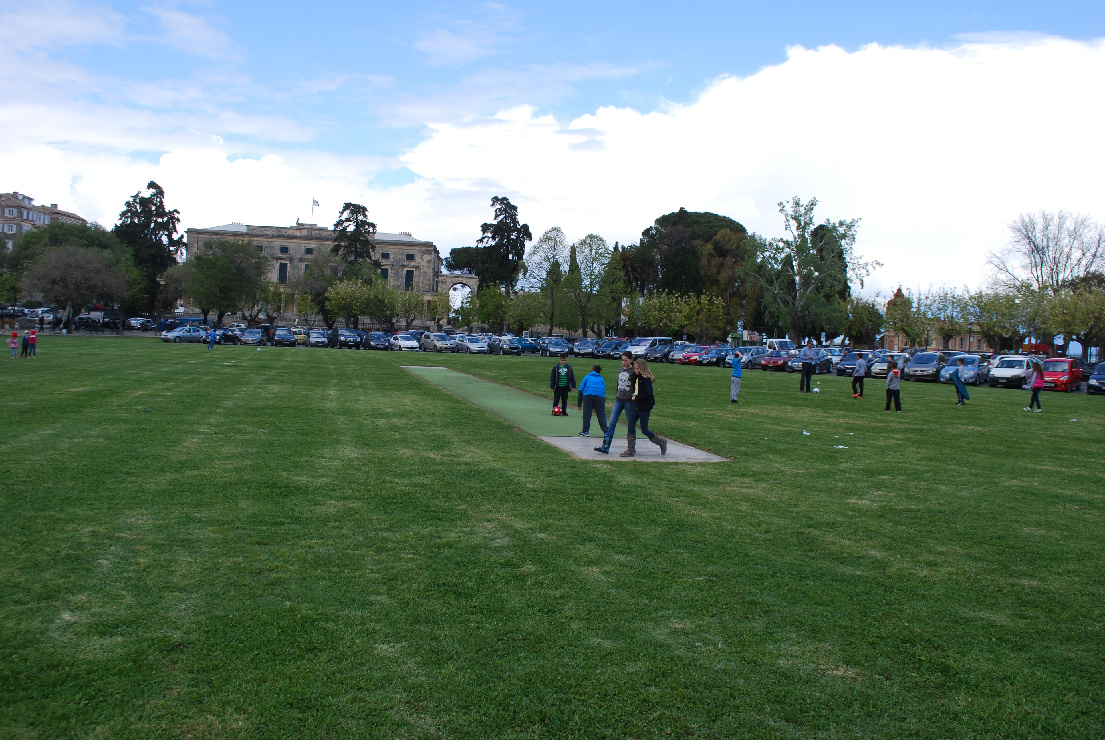 Vue de la vieille ville de Corfou.